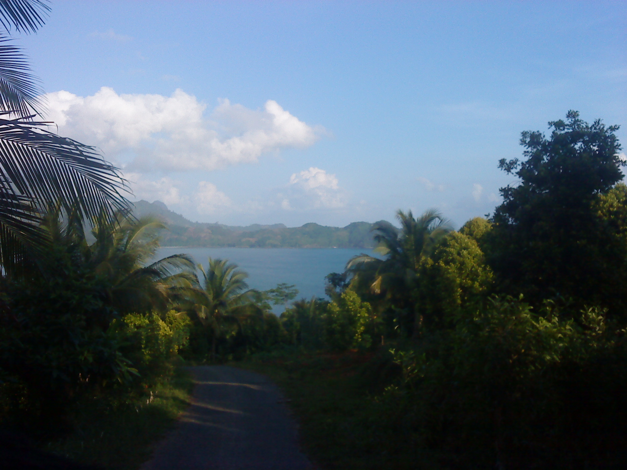 Gampiran Beach, Munjungan, Trenggalek